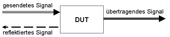 Funktionsschema eines Netzwerkanalysators